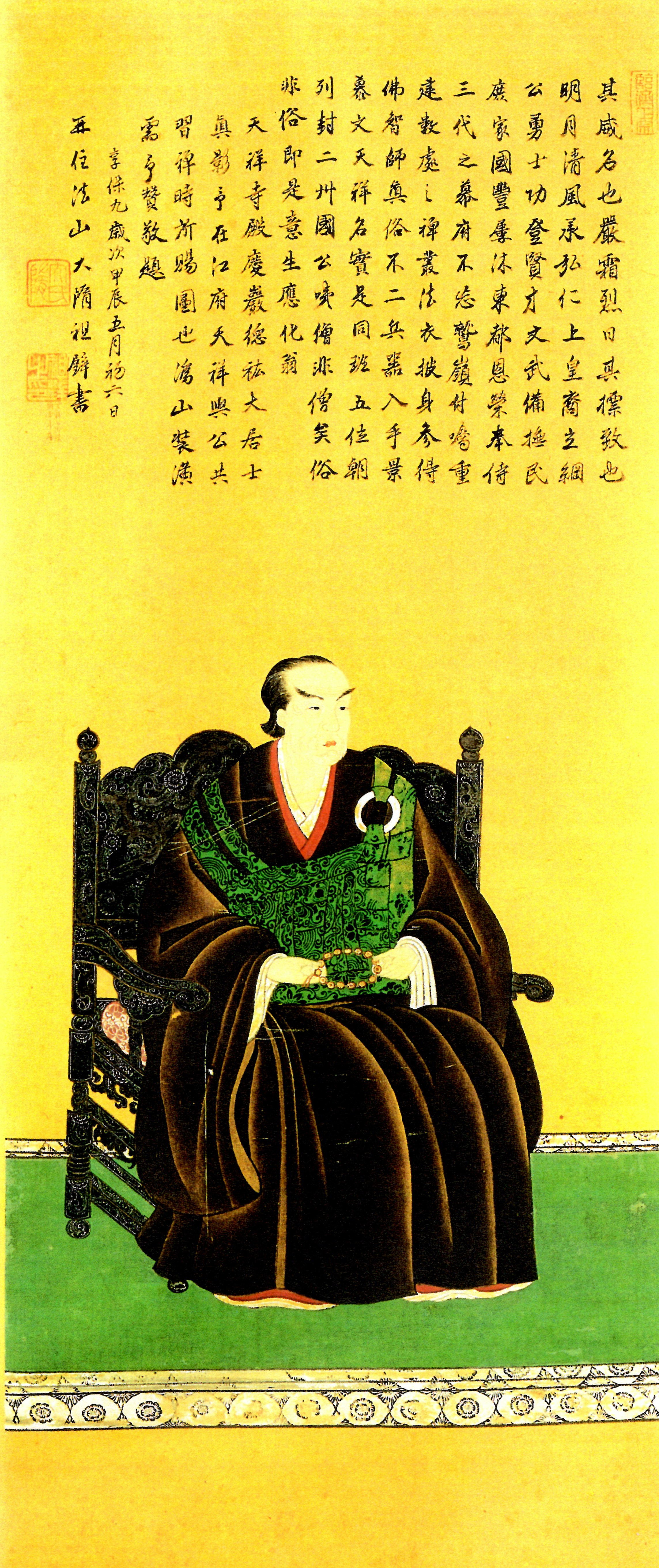 松浦重信の肖像。